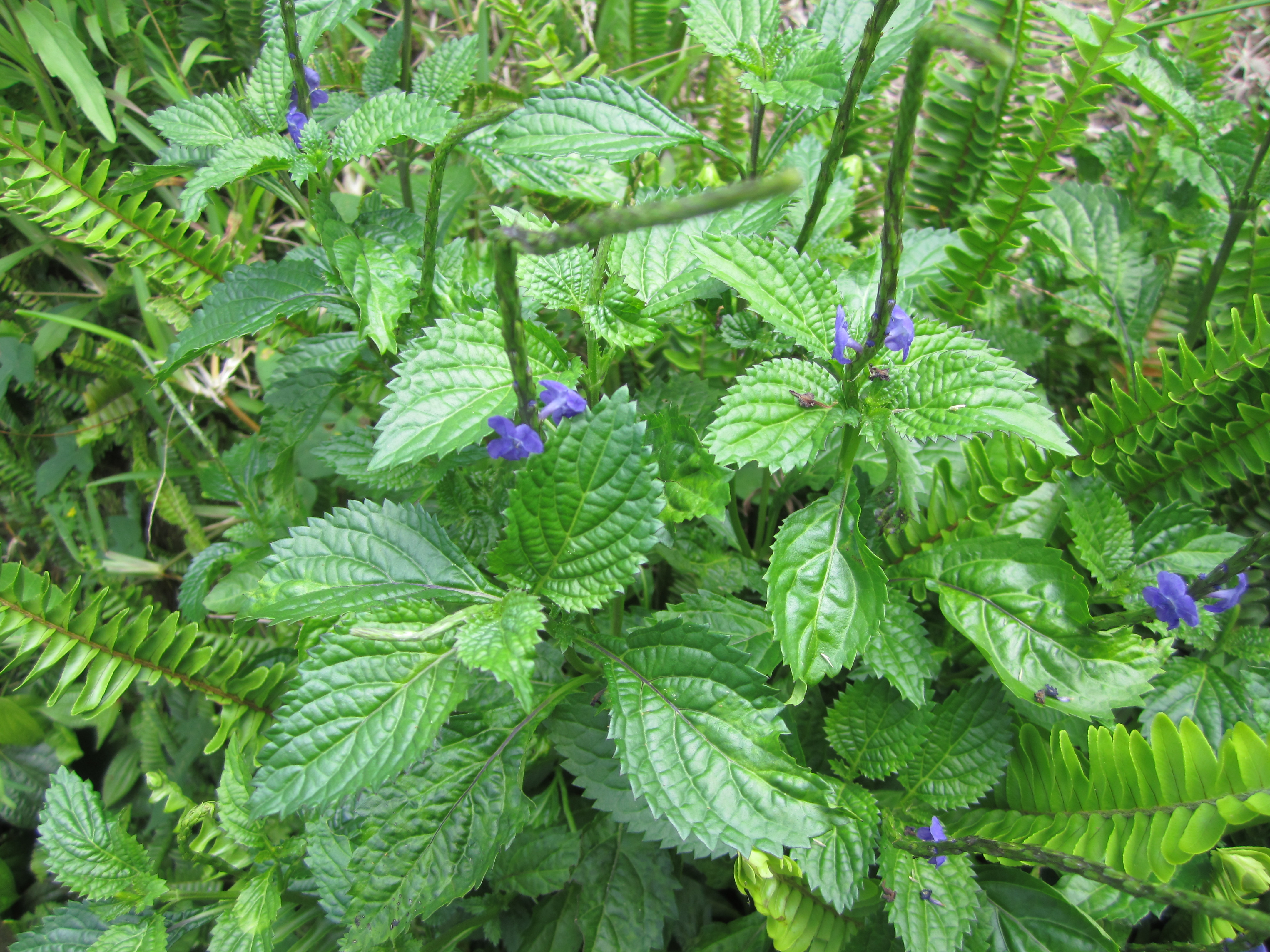 Verveine bleue île de la réunion